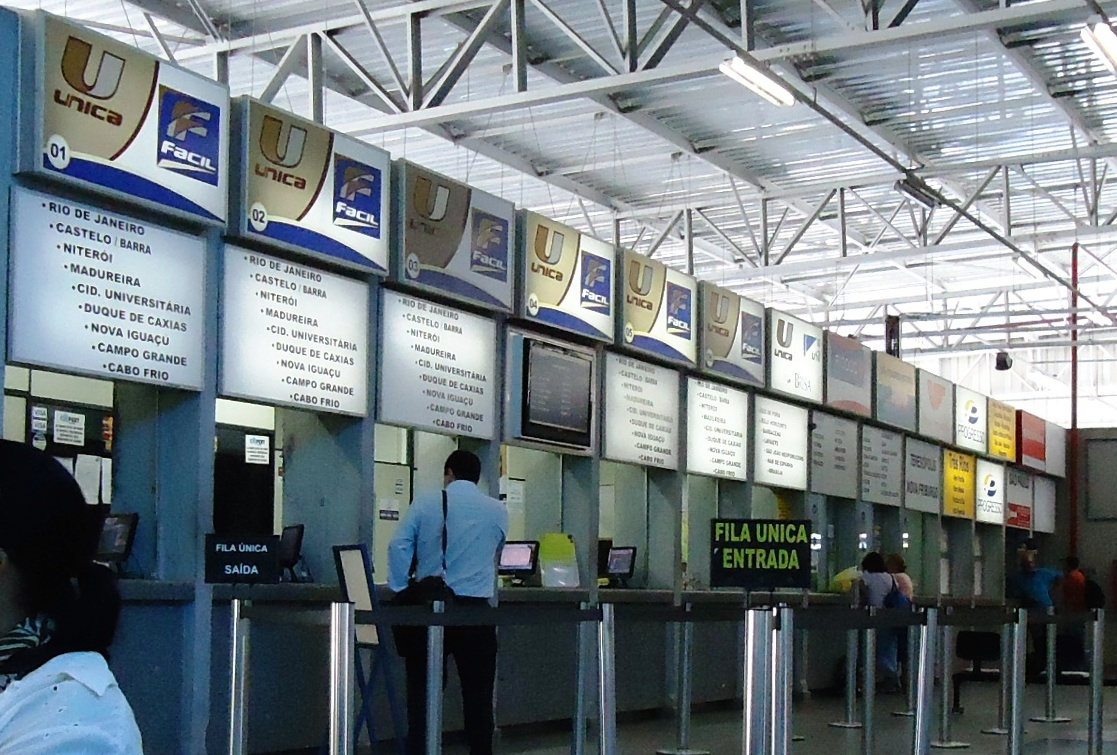 Bilheteria Transportes Única Petrópolis - Fácil Transportes e Turismo